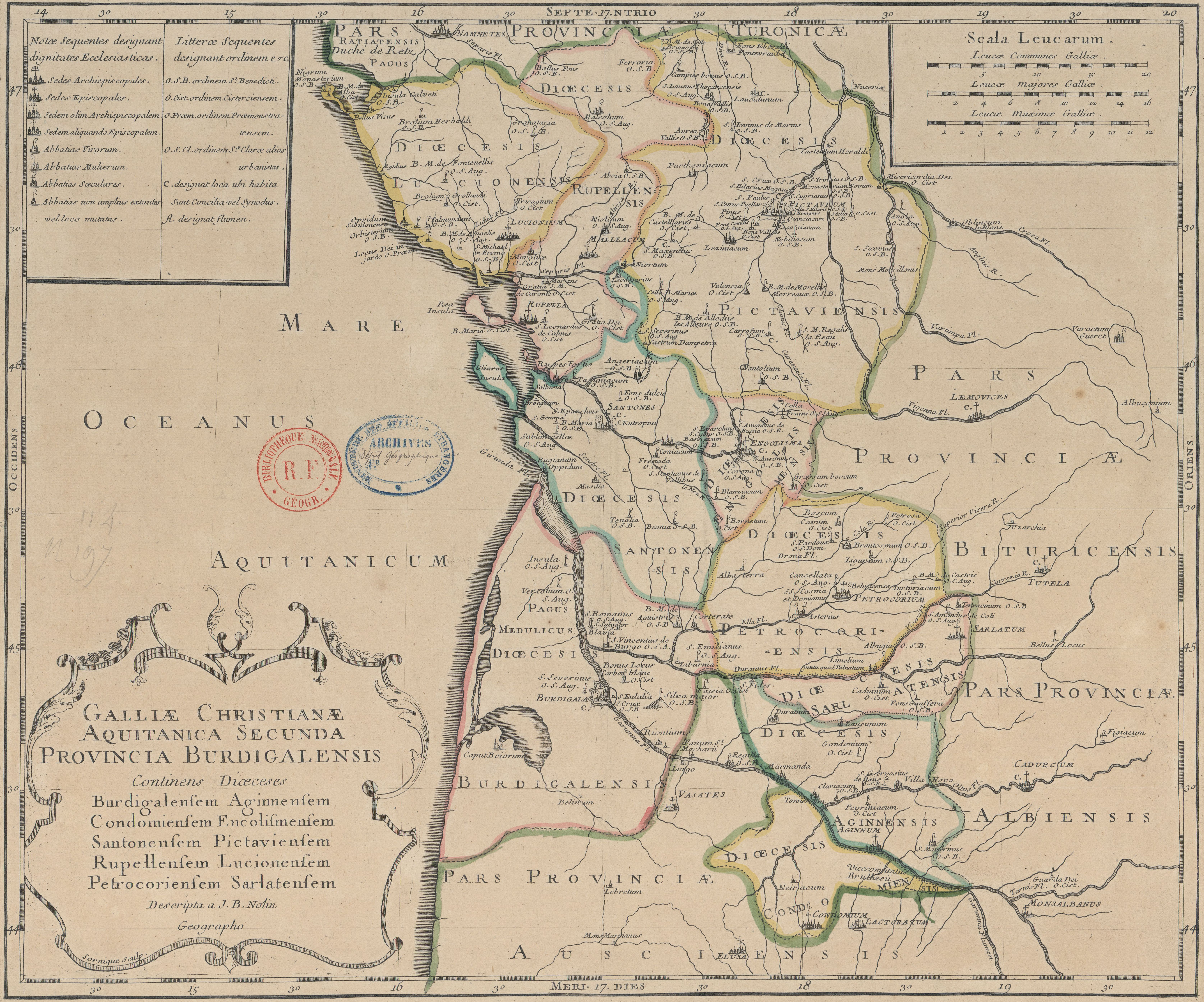 Carte de l'ancienne province ecclésiastique de Bordeaux (Aquitaine II), insérée dans le Tome 2 de la Gallia Christiana (1720).